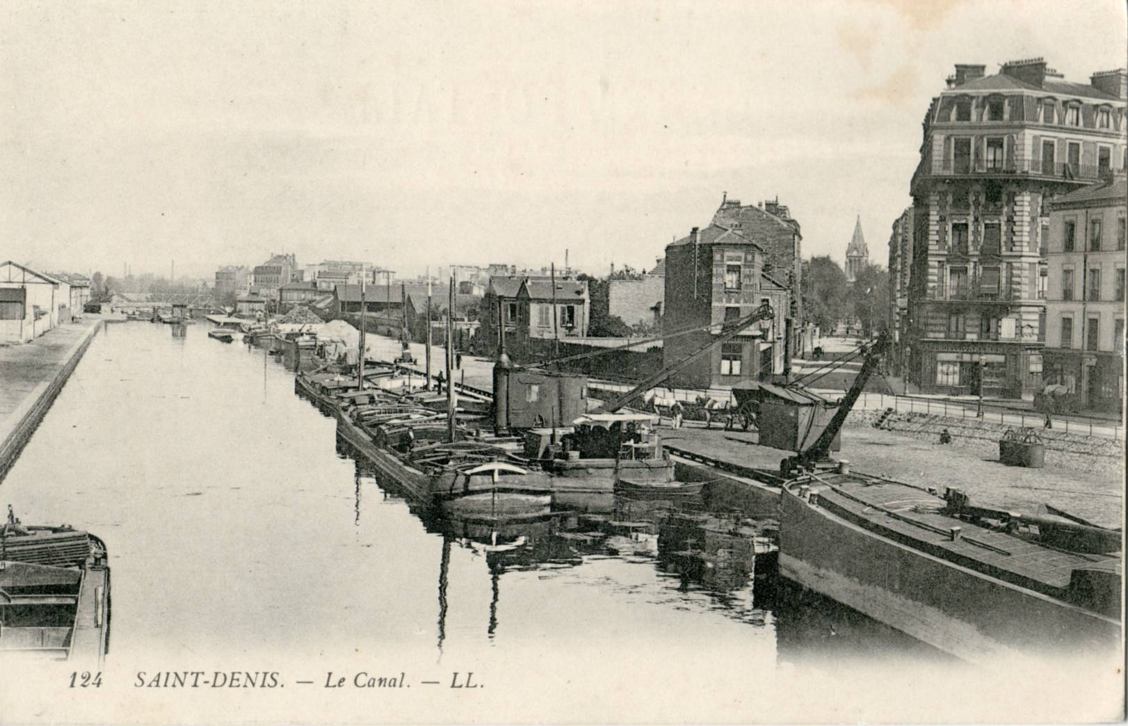 Carte postale ancienne éditée par LL N°124 Le port de Saint-Denis sur le Canal Saint-Denis à l'angle de la rue Denfert-Rochereau.La maison d'angle fait l'objet d'une célèbre photo de Robert Doisneau